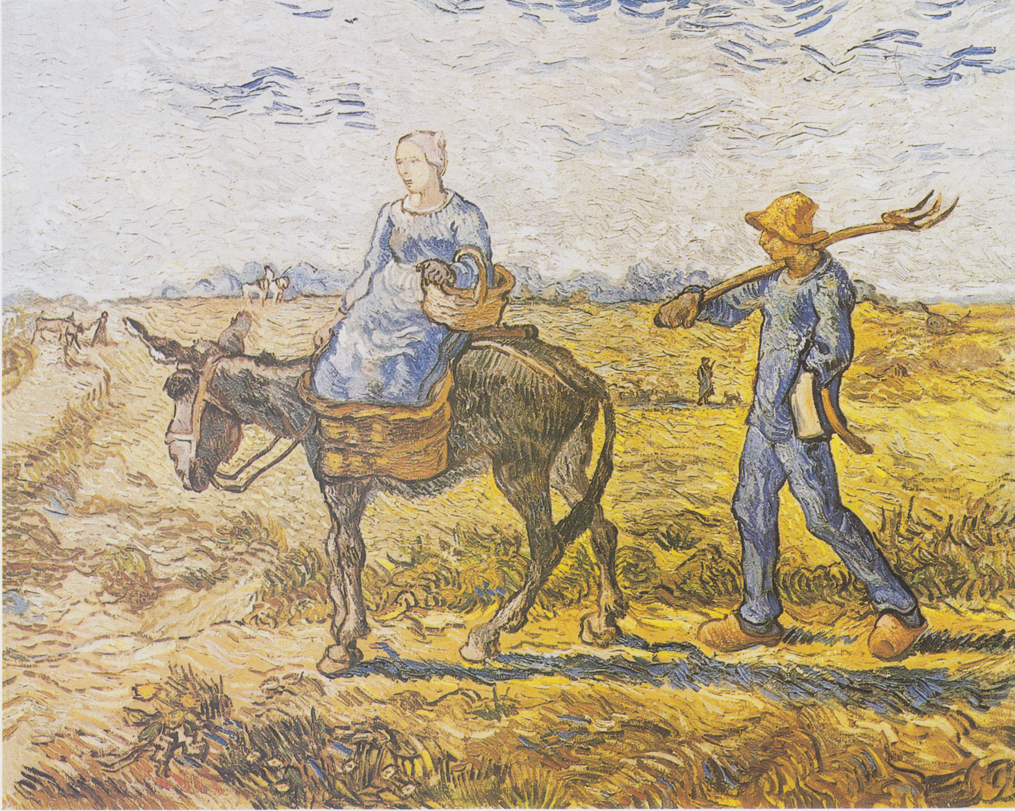 After Millet